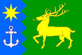 Bandera de Cervo, en Lugo (España)